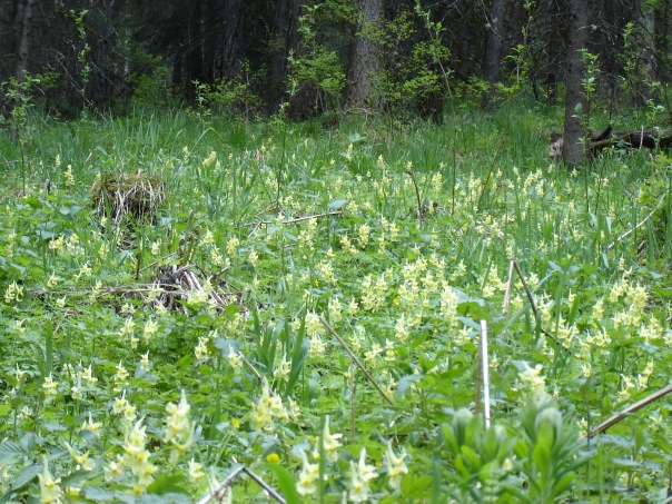 Сообщество с участием хохлатки прицветниковой.Заповедник Столбы.